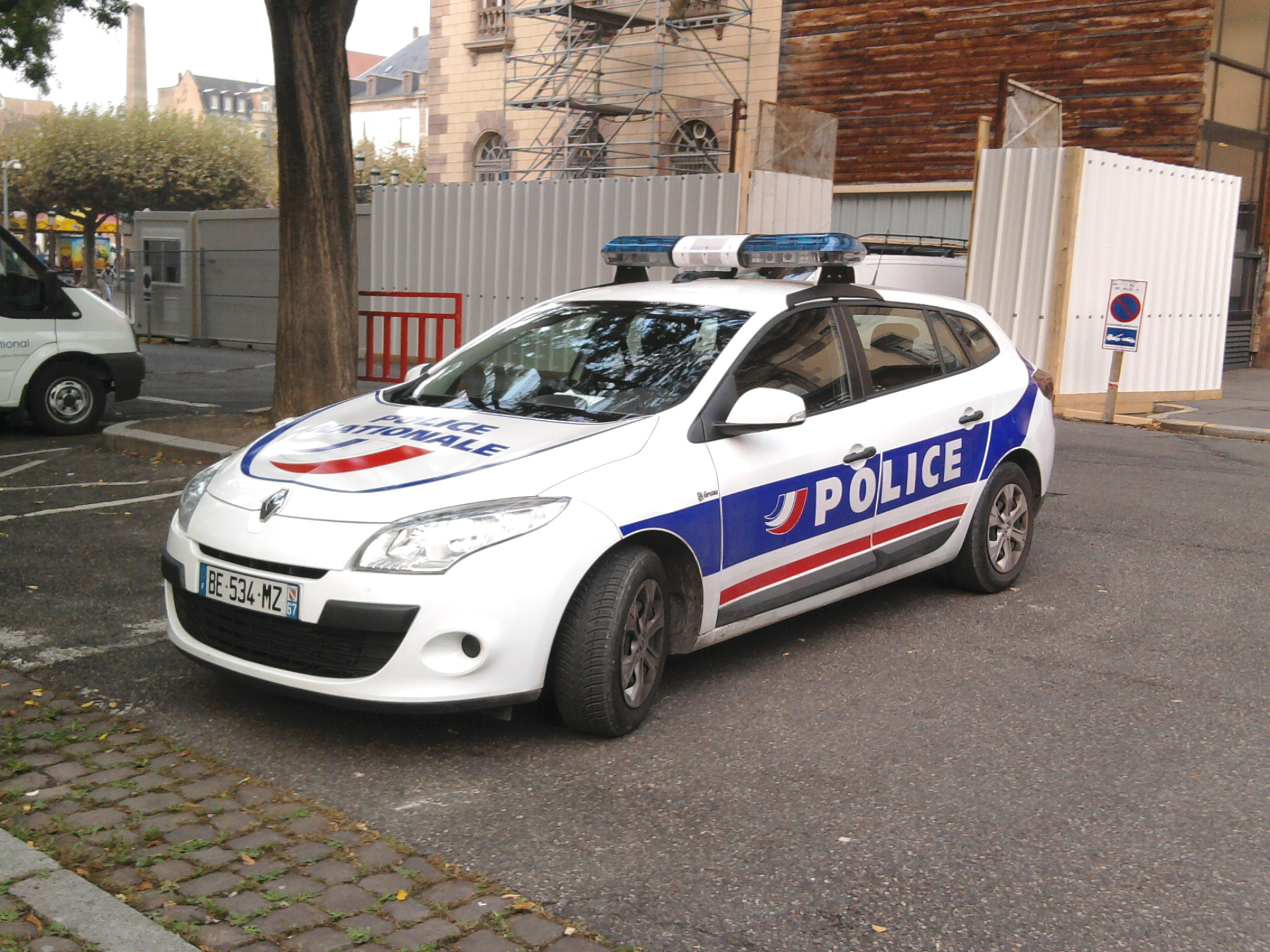 Renault Mégane break, équipée du système Lapi, à savoir «lecture automatique des places d'immatriculation», en faction devant la résidence du préfet du Bas-Rhin, près de la Place de la République, Strasbourg